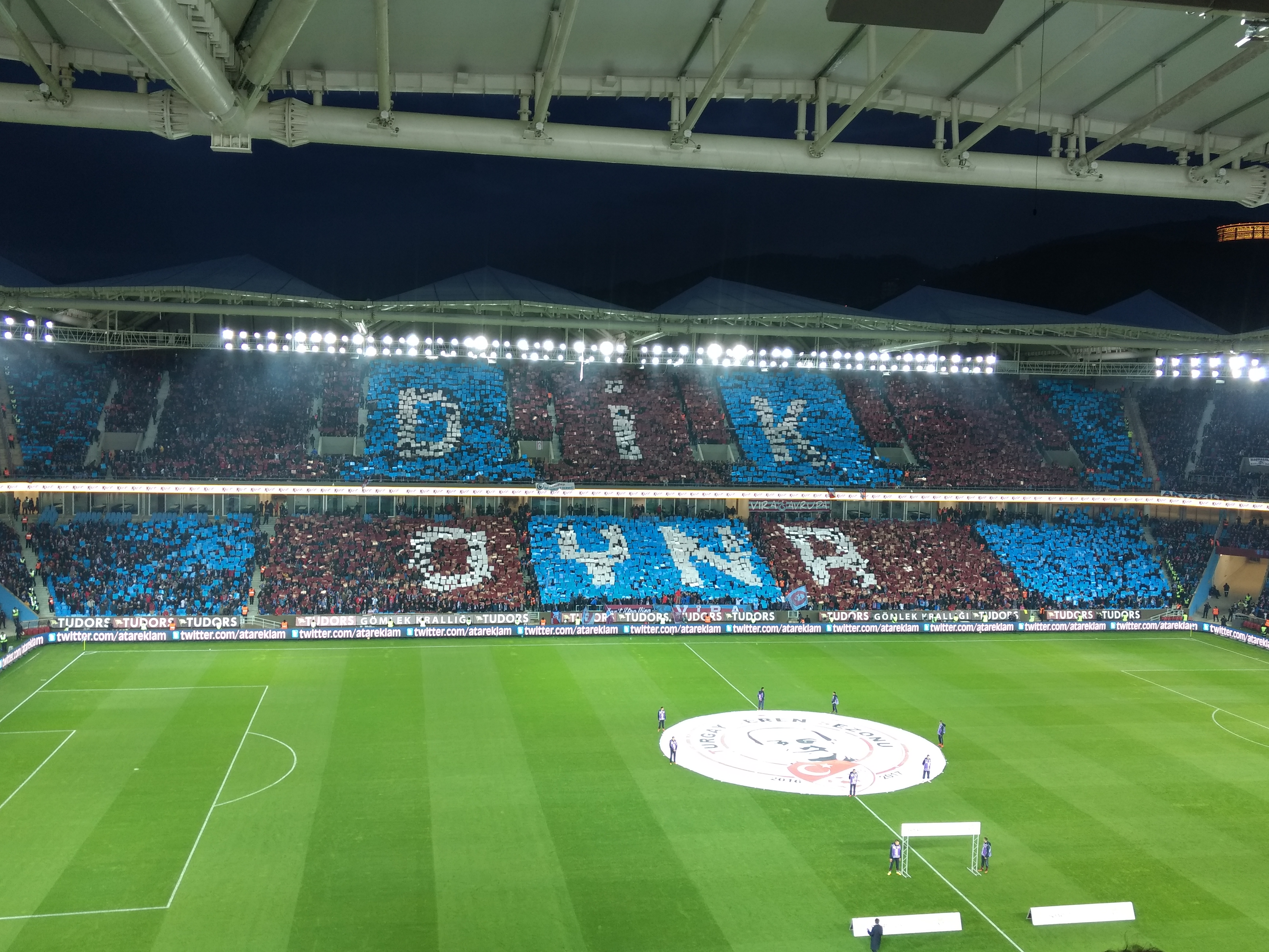 18 Mart 2017 tarihli Trabzonspor - Galatasaray maçından bir görünüm.